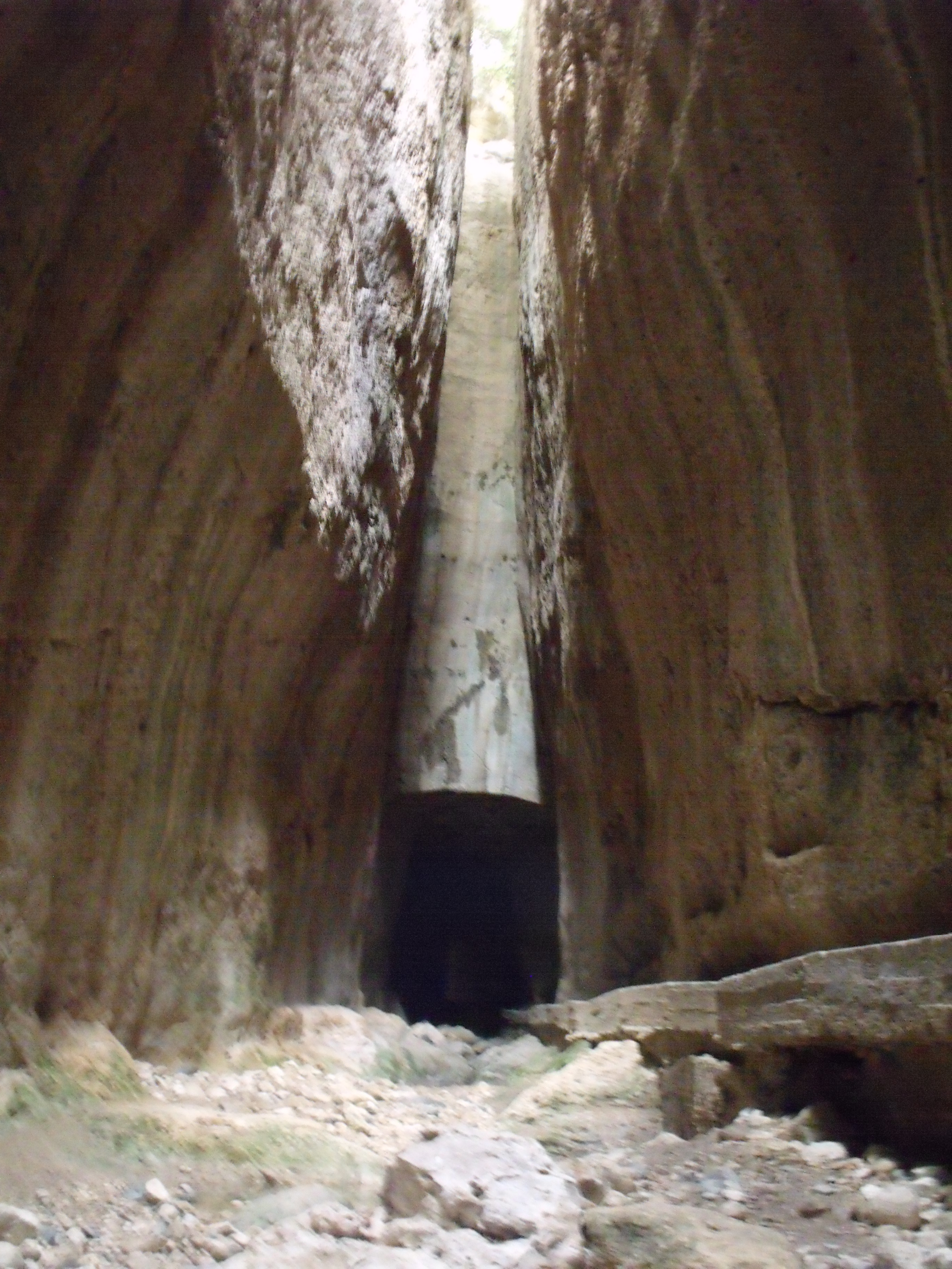 SAMANDAĞ- TİTUS TÜNELİ (SELEUKEİA PİERİA) EKİM 2011